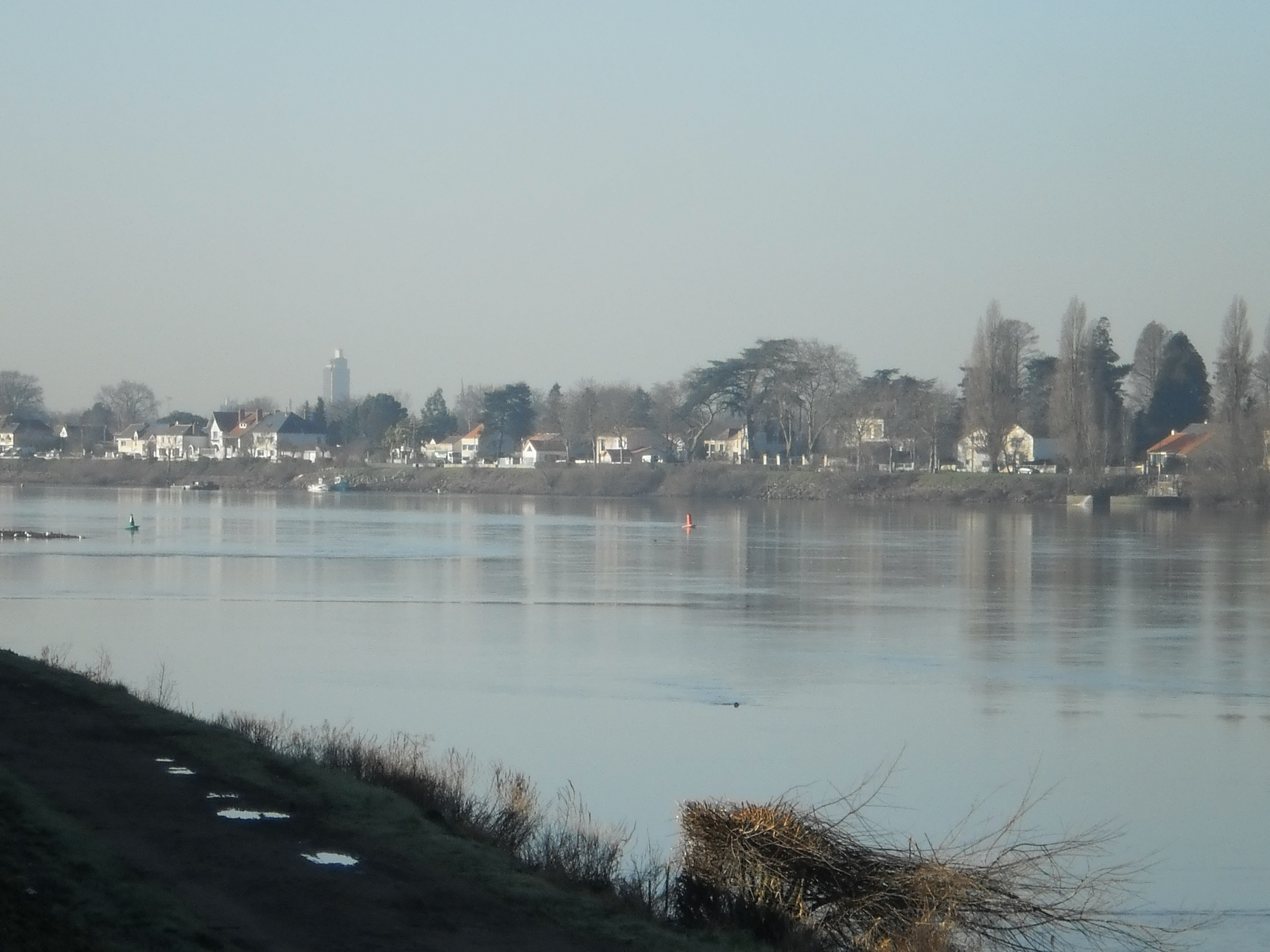 Village de Bellevue - Sainte-Luce-sur-Loire (Loire-Atlantique, France). Le village de Bellevue pris depuis la rive opposée de la Loire.